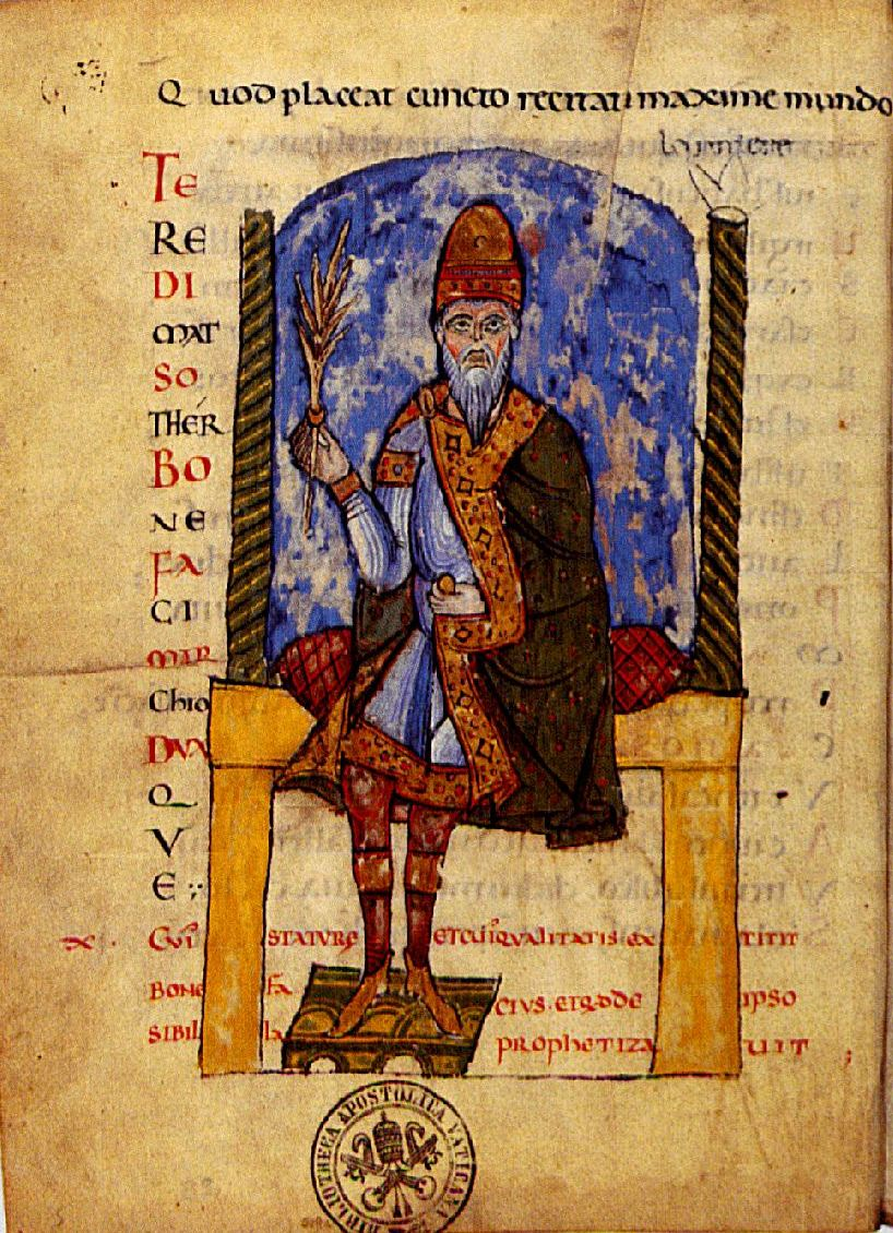 Bonifaz von Tuszien, Vita Mathildis des Donizo, um 1115. Vatikanstadt, BAV, Ms. Vat. lat. 4922, fol. 28v.